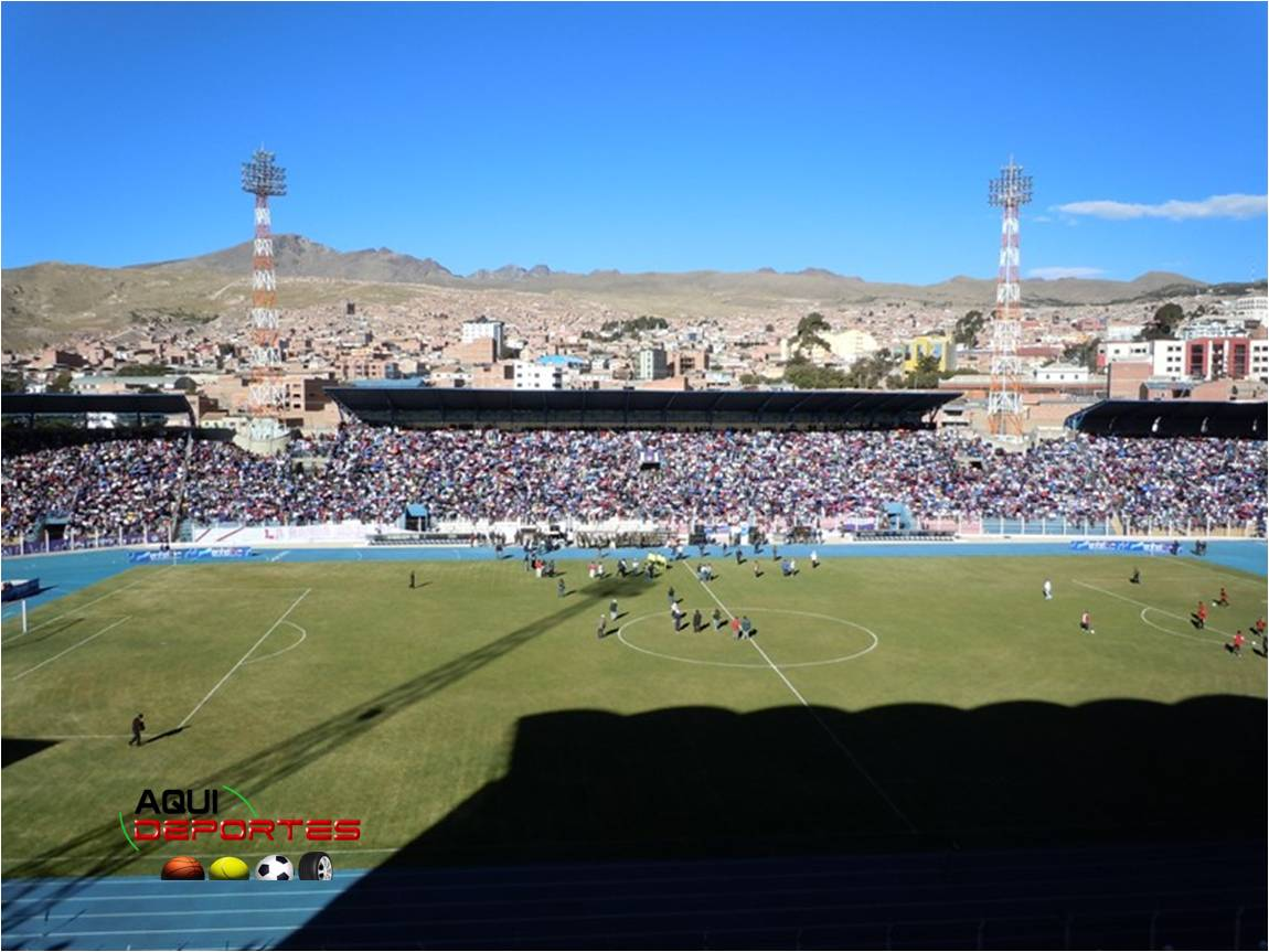 Estadio vau